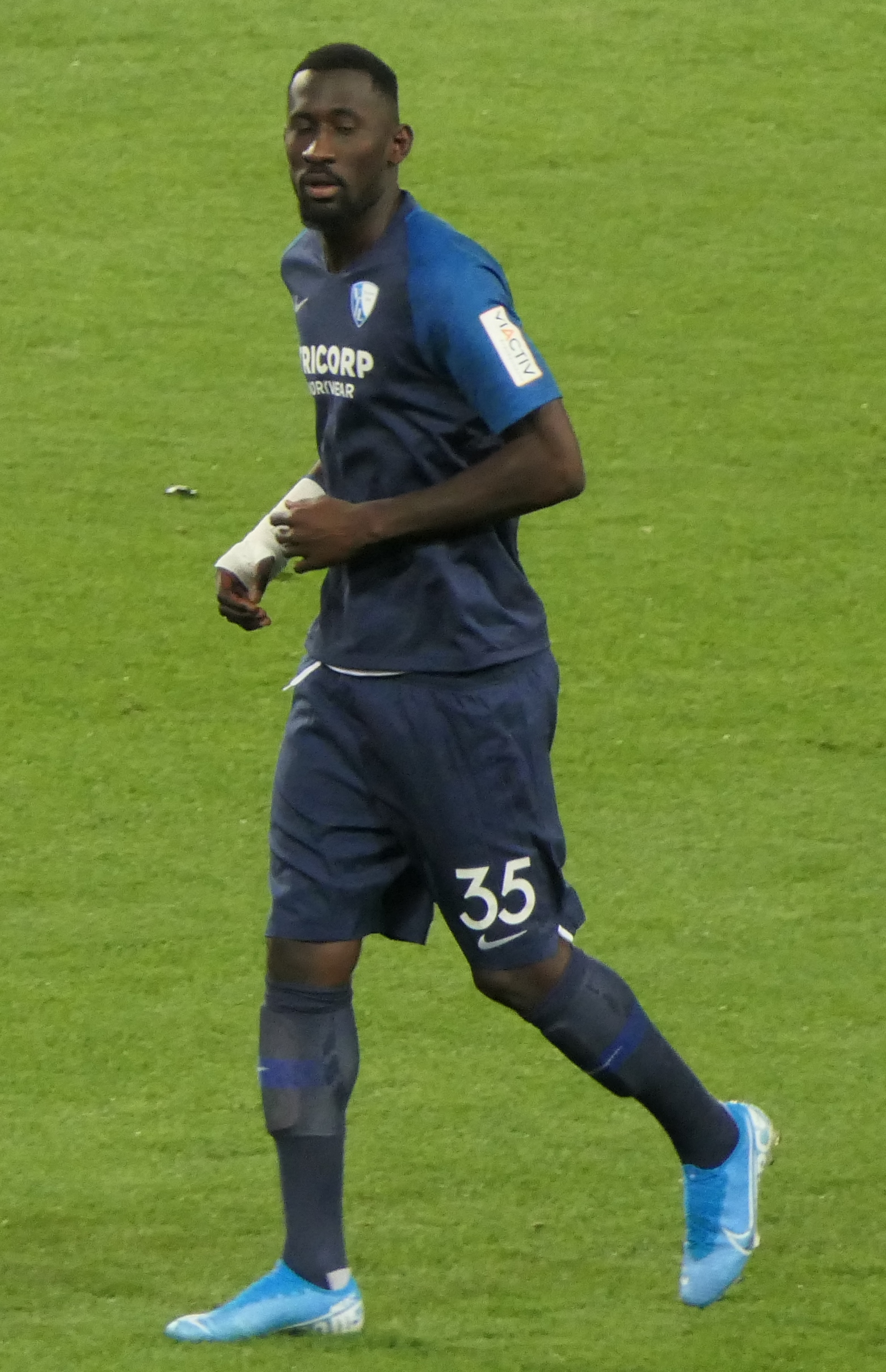 Der Fussballprofi Silvère Ganvoula im Trikot vom VfL Bochum beim Auswärtsspiel gegen den VfB Stuttgart am 02.09.2019.